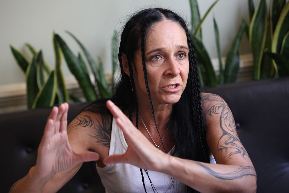 Kandidátka do senátu Miloslava Pošvářová